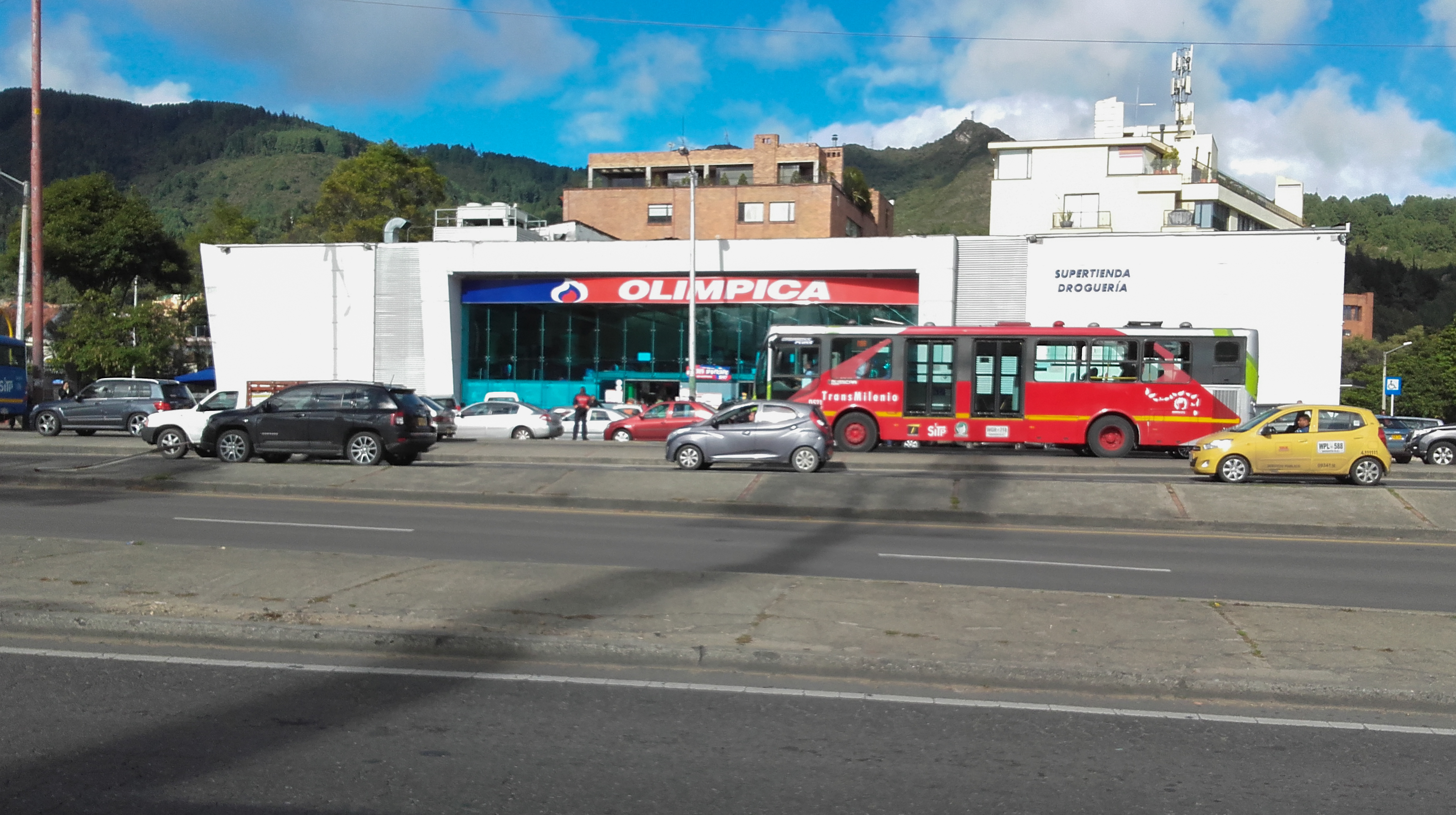 dndnndnd